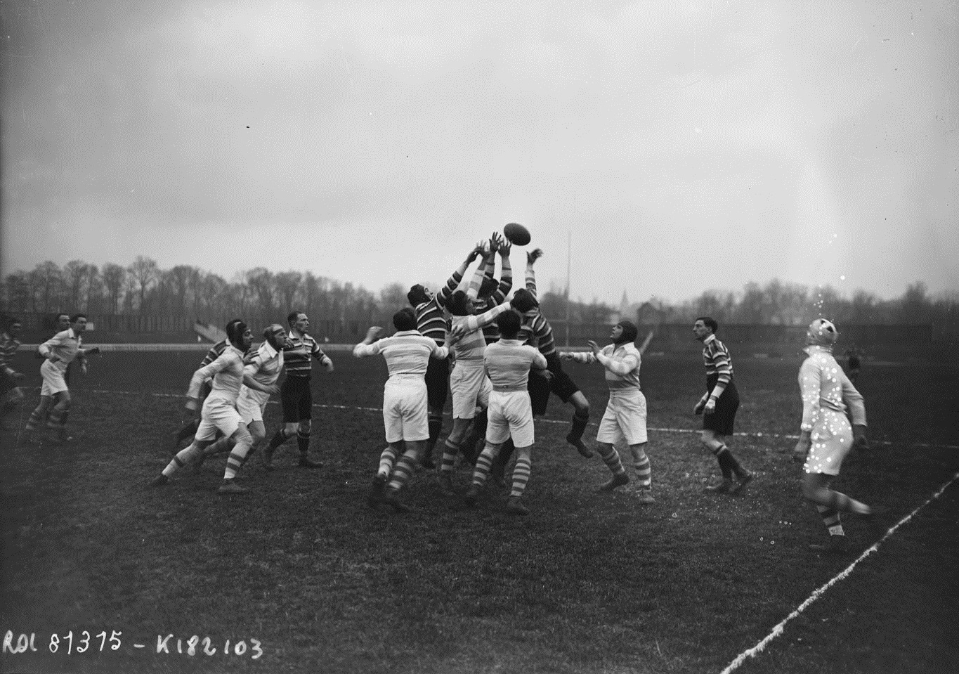 Touche lors du match Racing-Leicester à Colombes, le 13 février 1923.